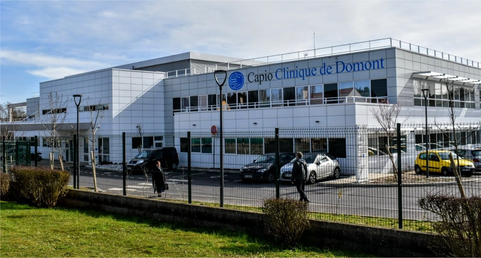 Une clinique qui est le premier centre ambulatoire de chirurgie lourde à voir le jour en île-de-France.